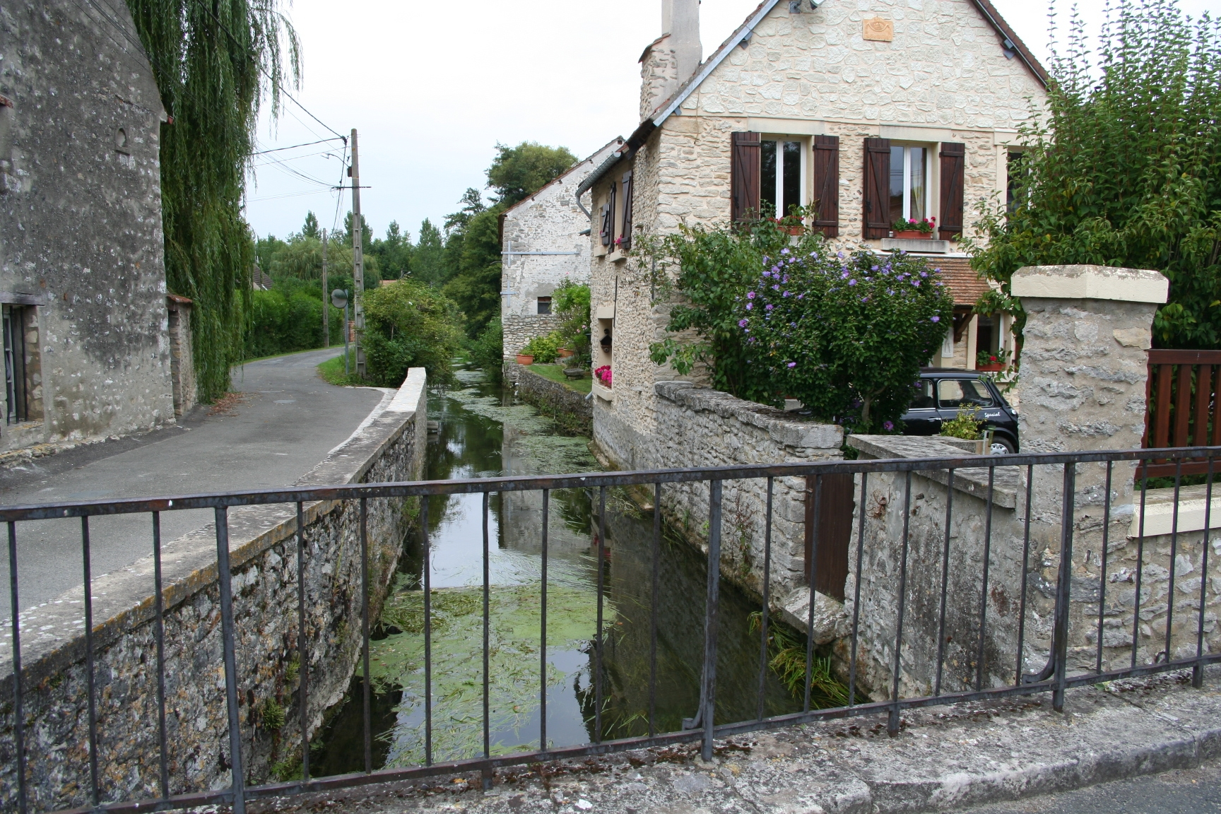 Le ru de Roconval au Mauverand, commune d'Amenucourt - Val-d'Oise, France